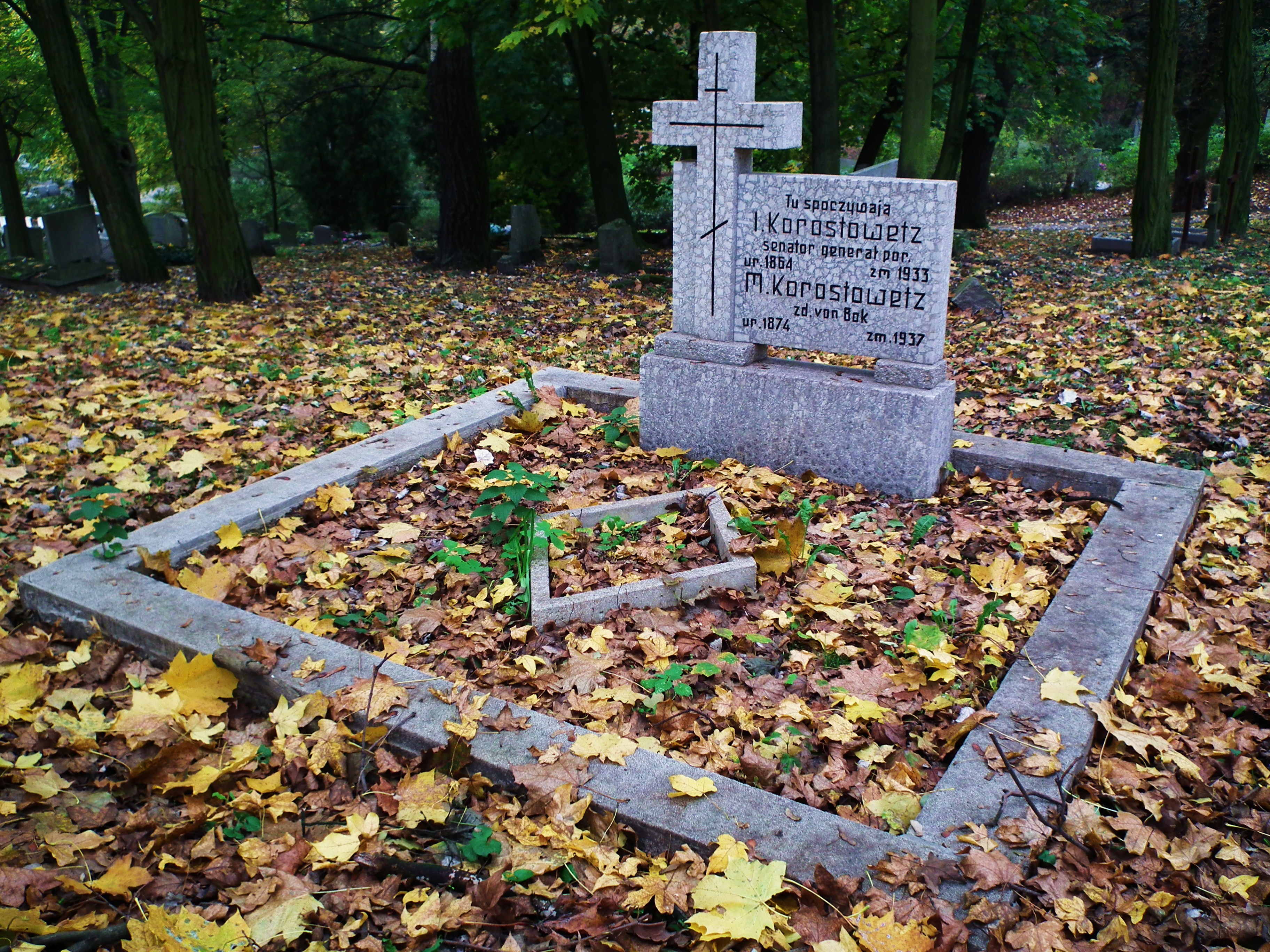 Grób Izmaiła Korostowica na Cytadeli w Poznaniu (zm. 1933).